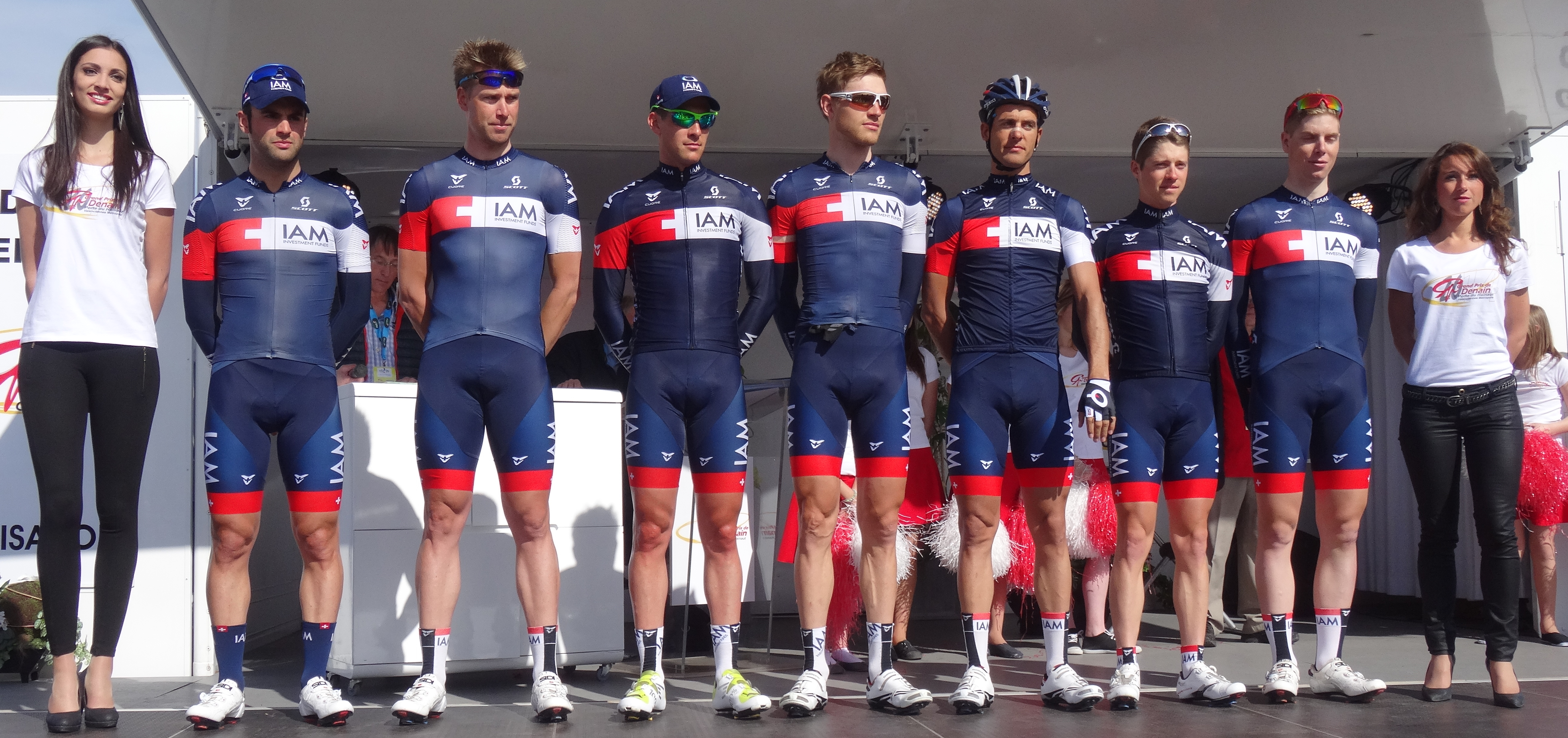 Reportage réalisé le jeudi 17 avril à l'occasion du départ et de l'arrivée du Grand Prix de Denain 2014 à Denain, Nord, Nord-Pas-de-Calais, France.